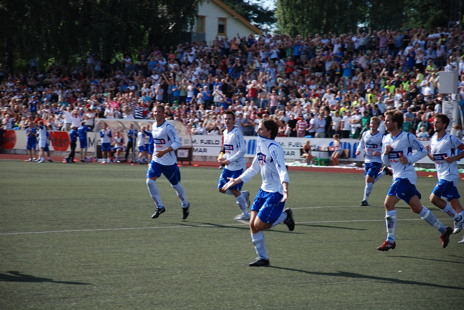 Jubelscener fra Brumunddal - Hamarkameratene 4-3